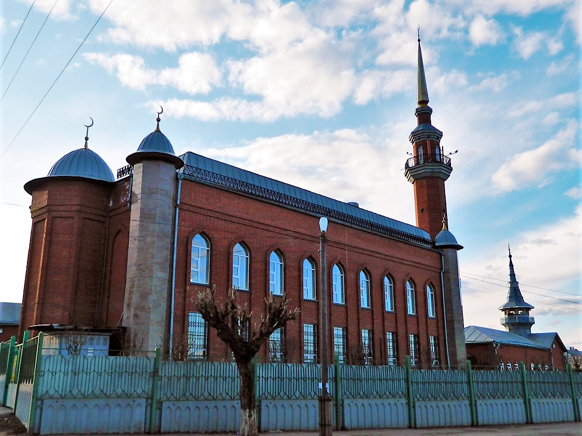 Ижевская соборная мечеть